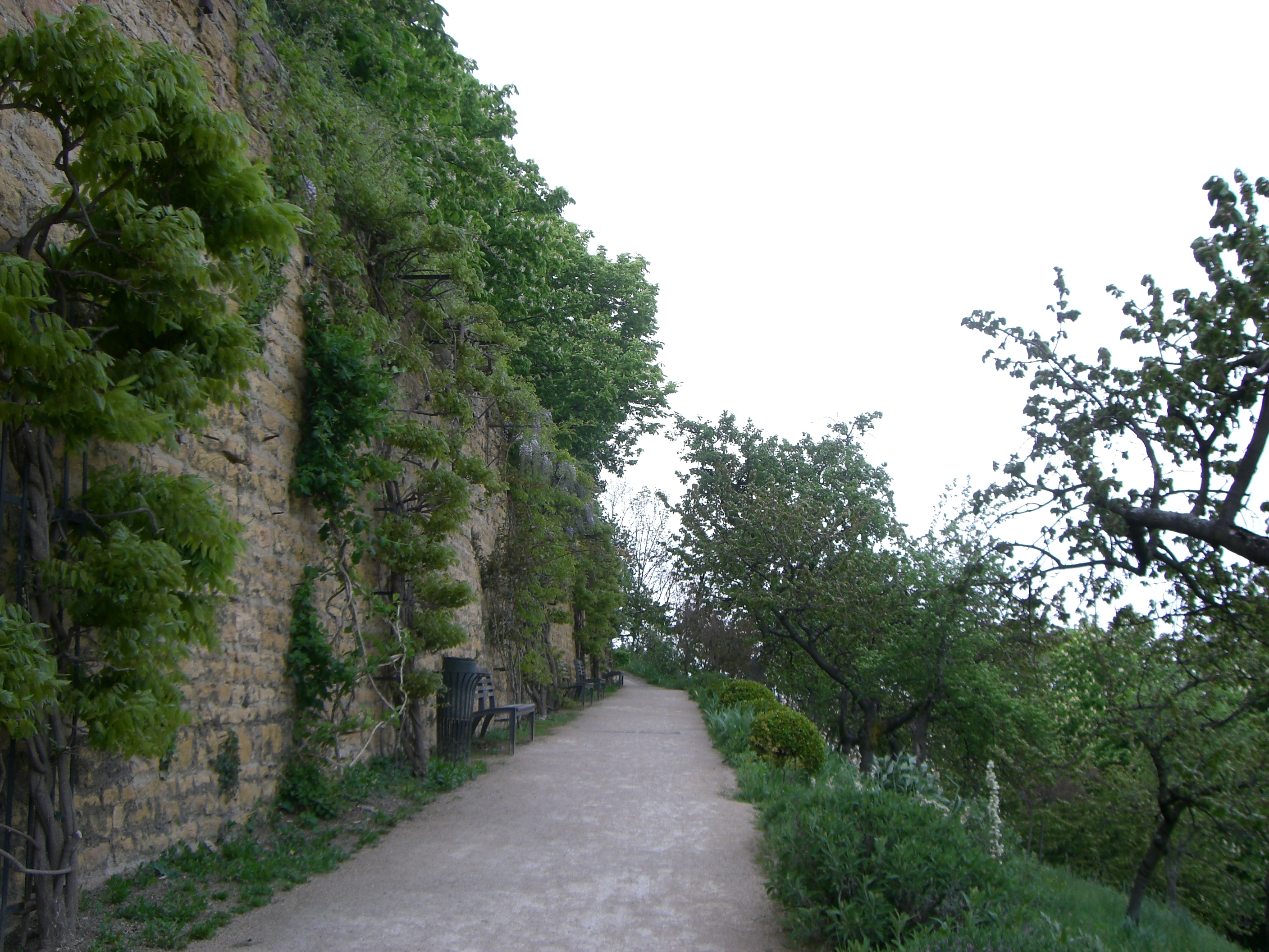 Lyon Par ces Hauteurs Verger